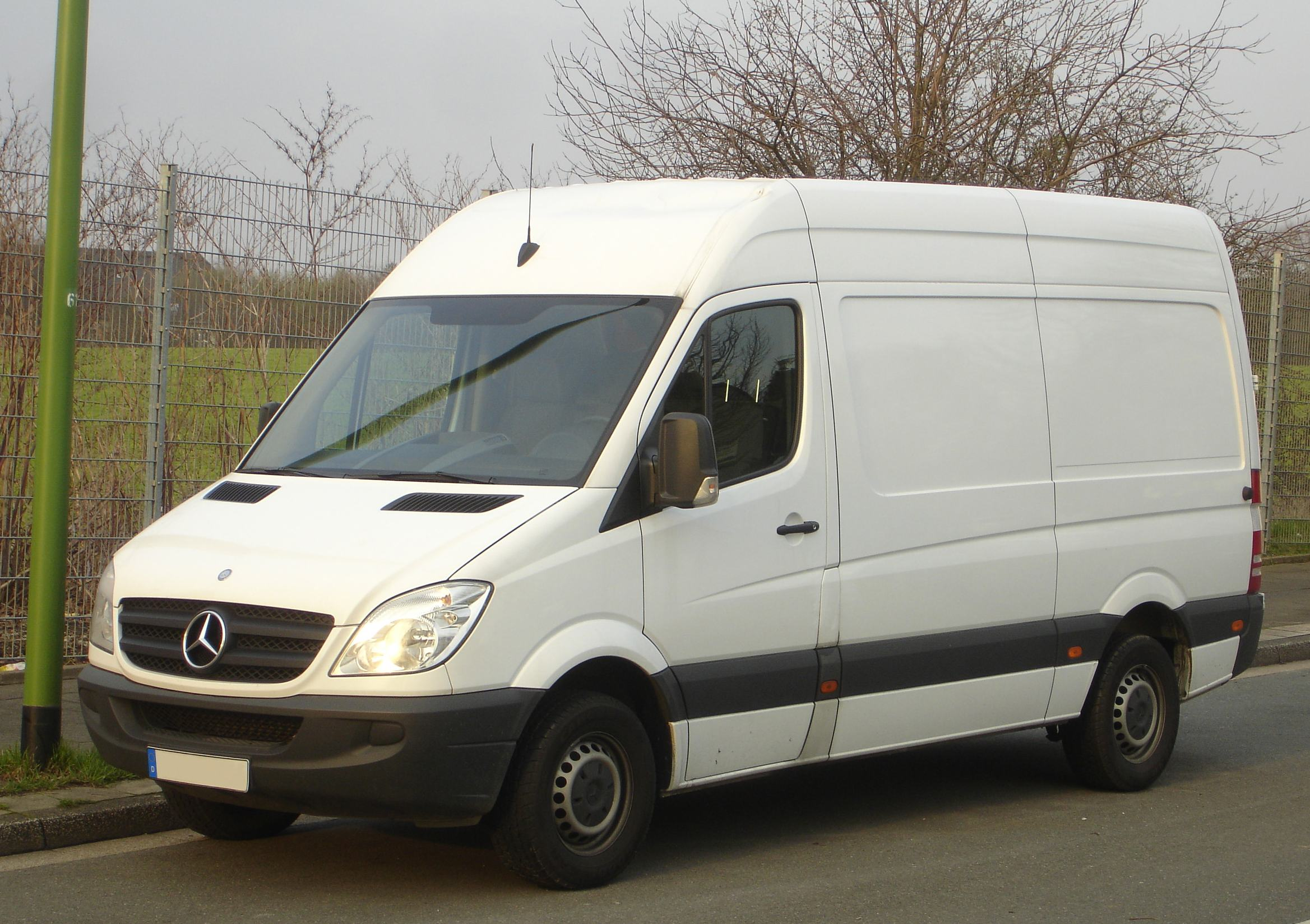 Mercedes-Benz Sprinter Modelljahr 2006